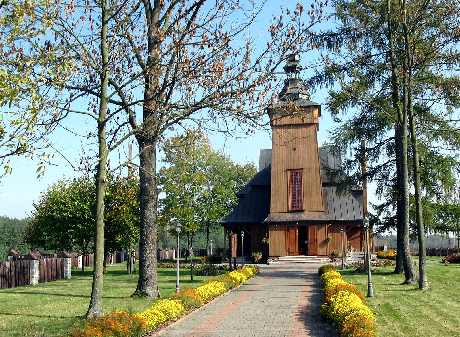 Kościół par. p.w. Podwyższenia Krzyża, drewn., 1935, Tokary, gmina Mielnik